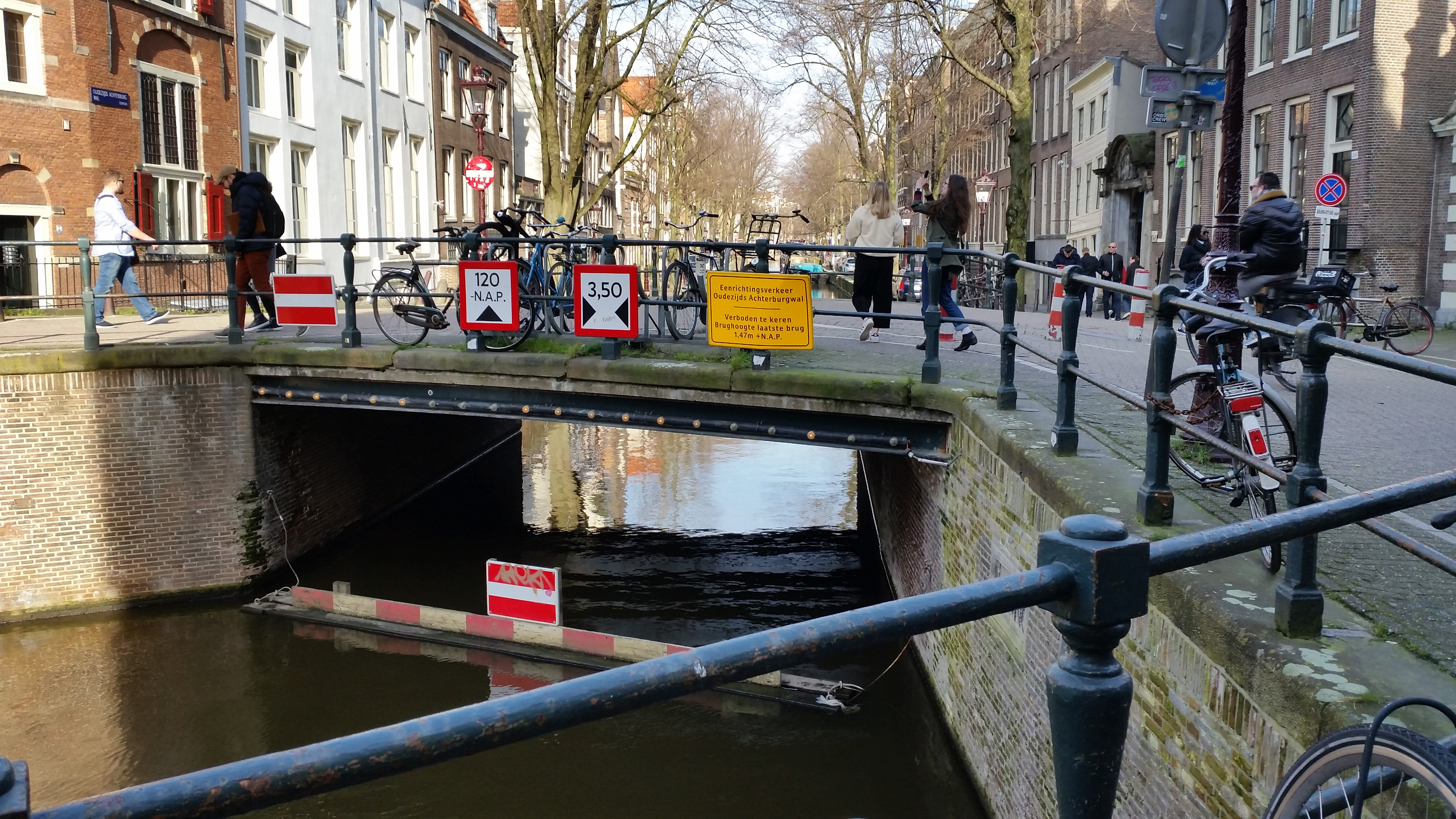 Zijaanzicht Brug 218